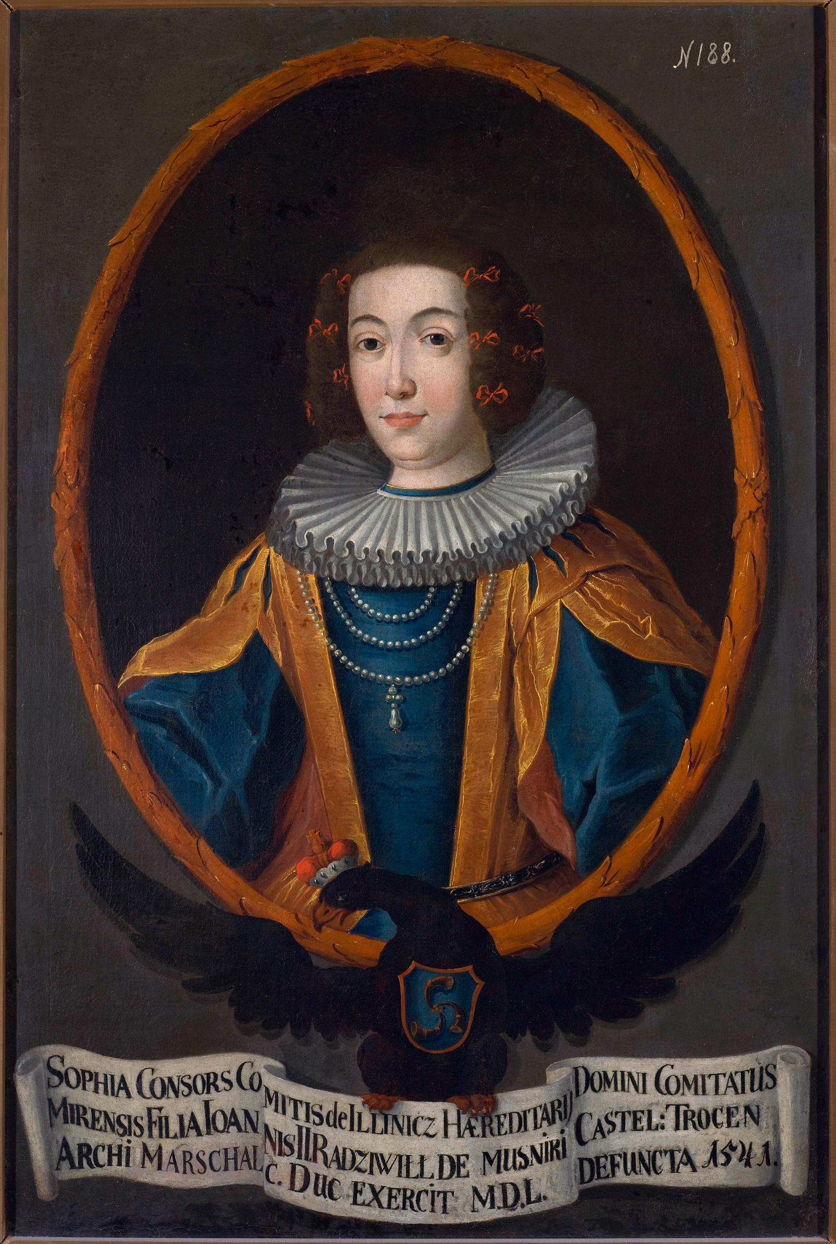 Беларуская (тарашкевіца): Партрэт Соф'і Ільлініч (Sofja Illinič) з Радзівілаў (Radzivił)